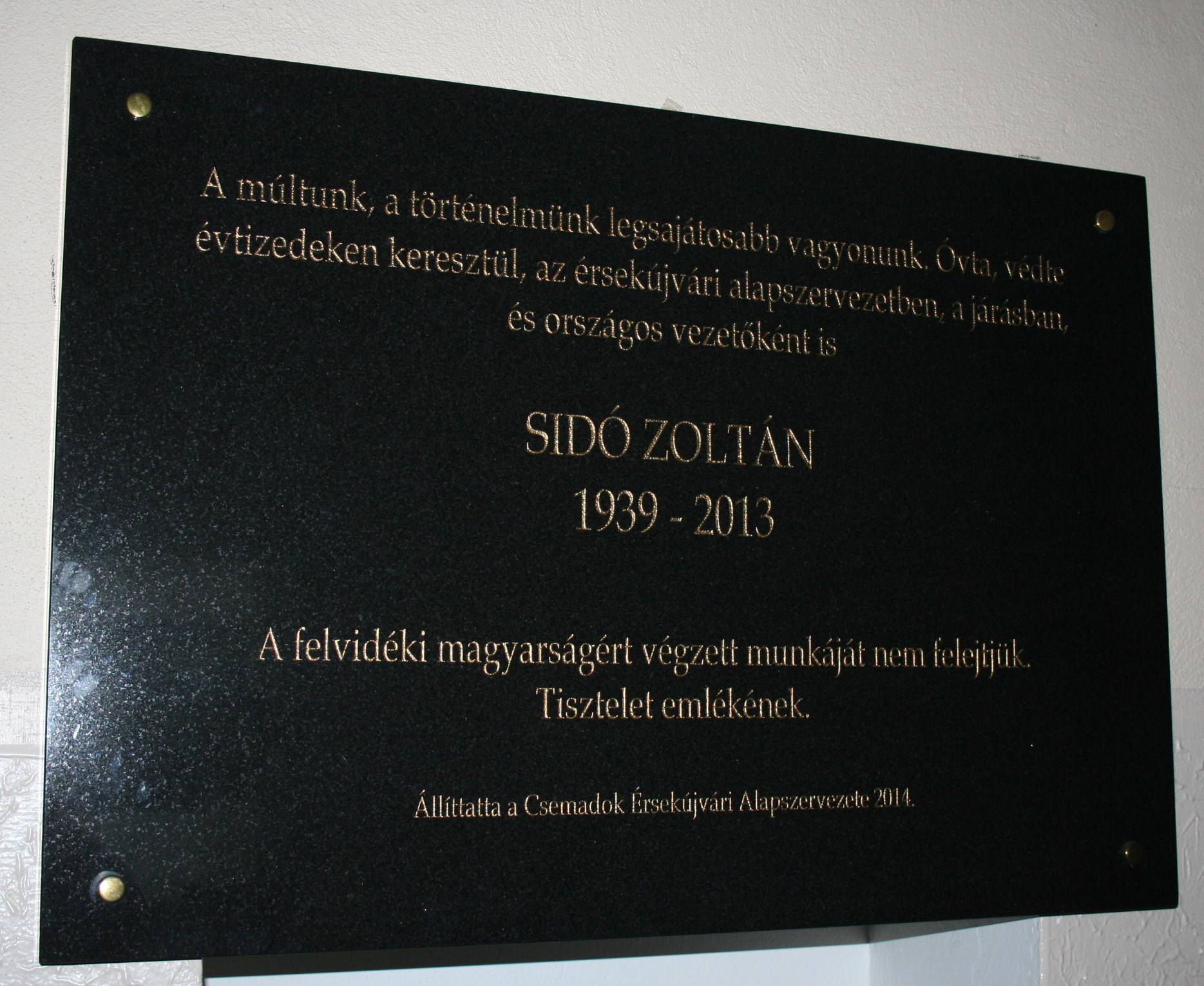 Sidó Zoltán emléktábla Érsekújvárott 2014